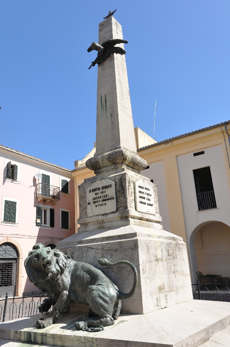 Penne (comune, Italy) 2012